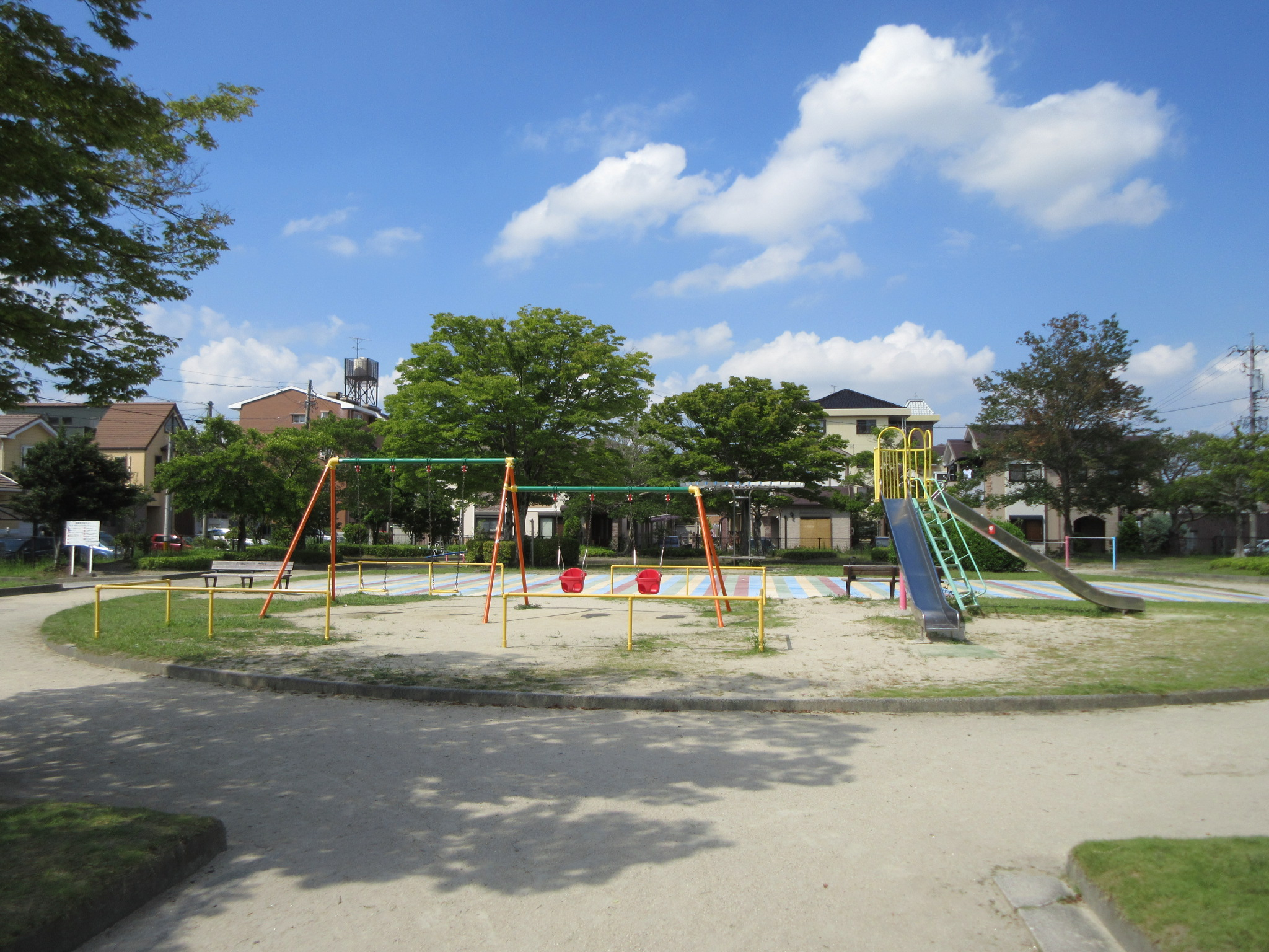 井ノ口公園（岡崎市井ノ口新町）